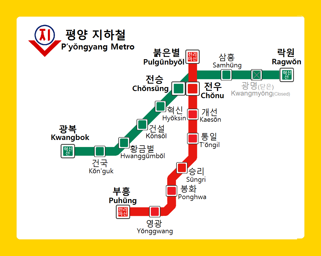 La carte de la metro de Pyongyang, Corée du Nord